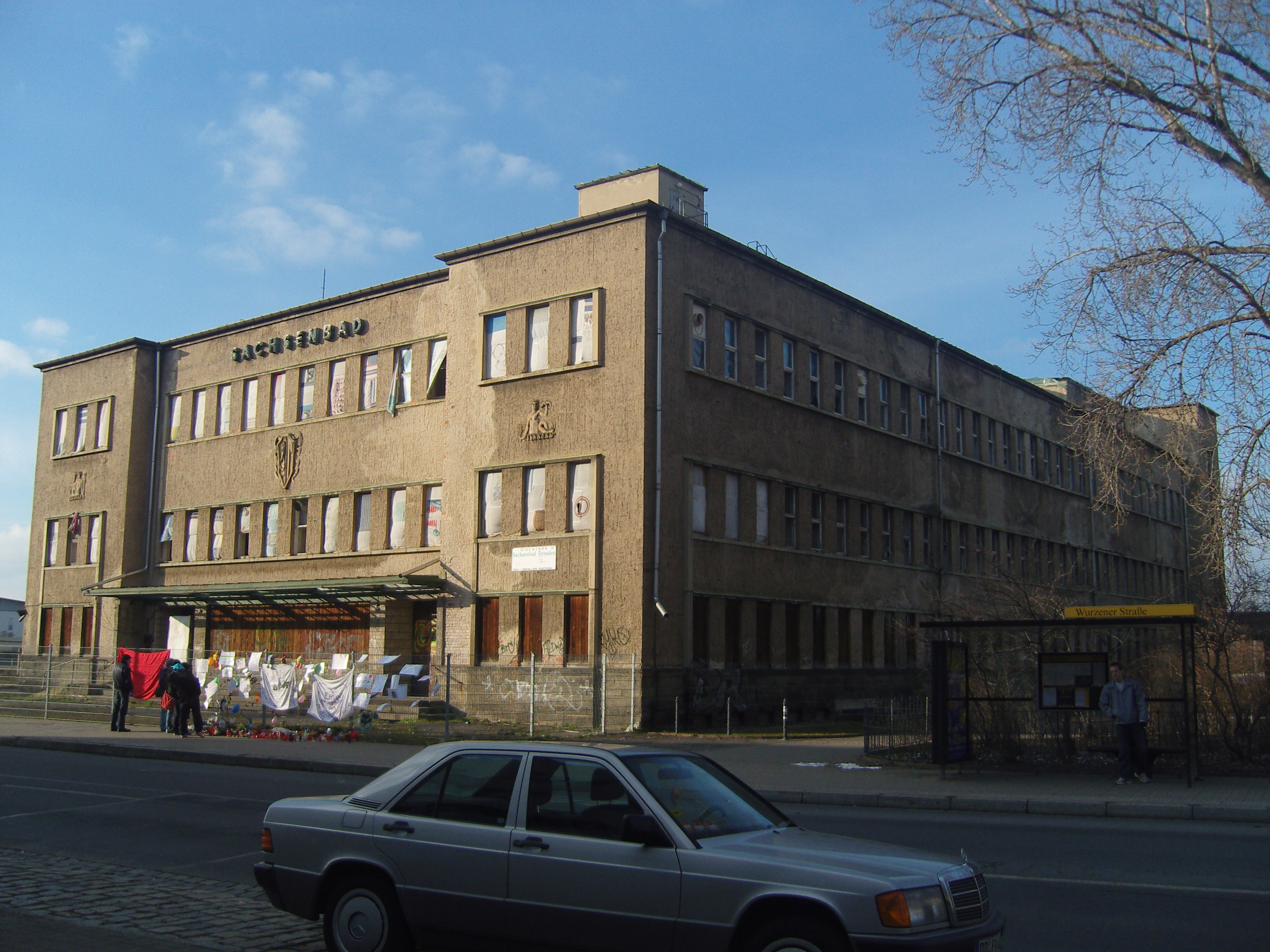 Denkmalgeschütztes Sachsenbad in Dresden, Wurzener Straße